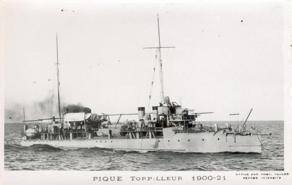 Destroyer français de classe Framée : Pique